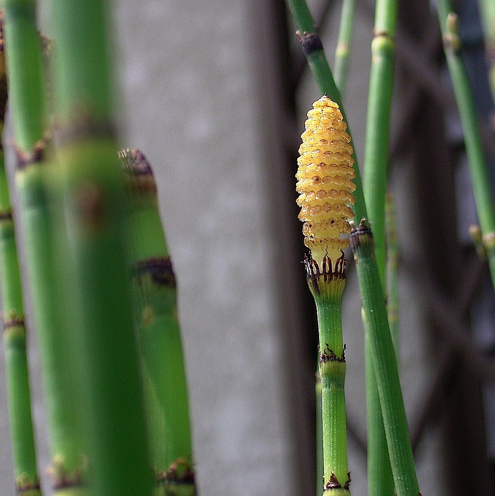 トクサ（学名：Equisetum hyemale 英名：）Species: Equisetum hyemale. 撮影場所: 神戸市東灘区 Kobe, Higashinada